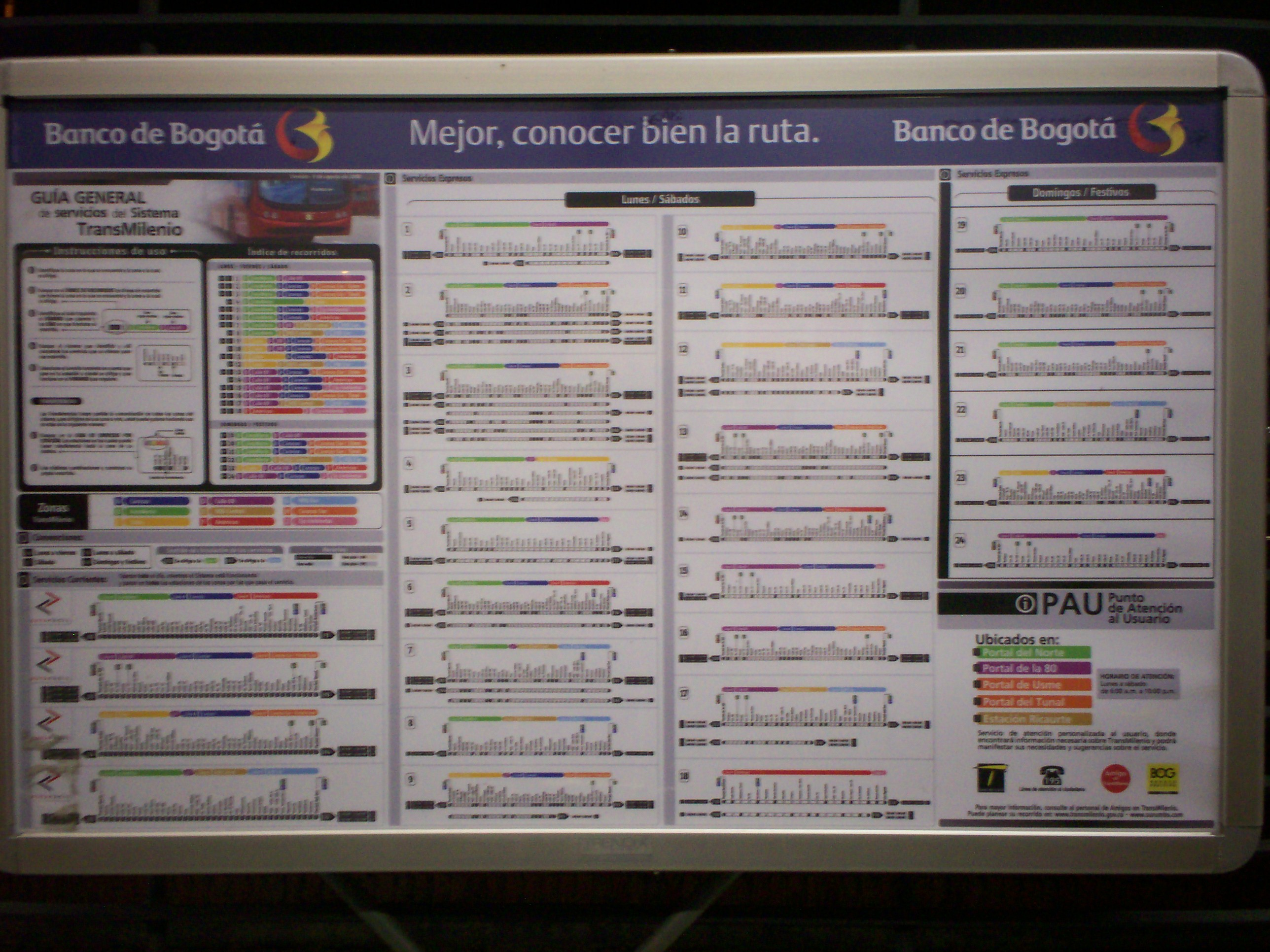 Mapa en el interior de las estaciones de TransMilenio